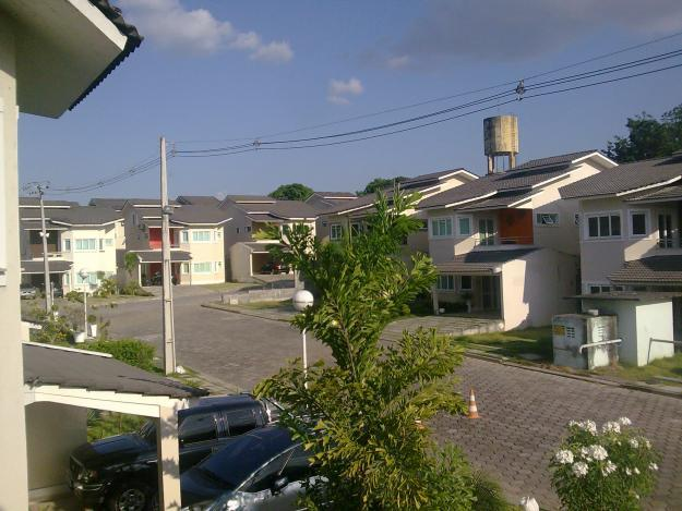 O conjunto residencial Portugal está situado no Parque das Laranjeiras, região centro-sul